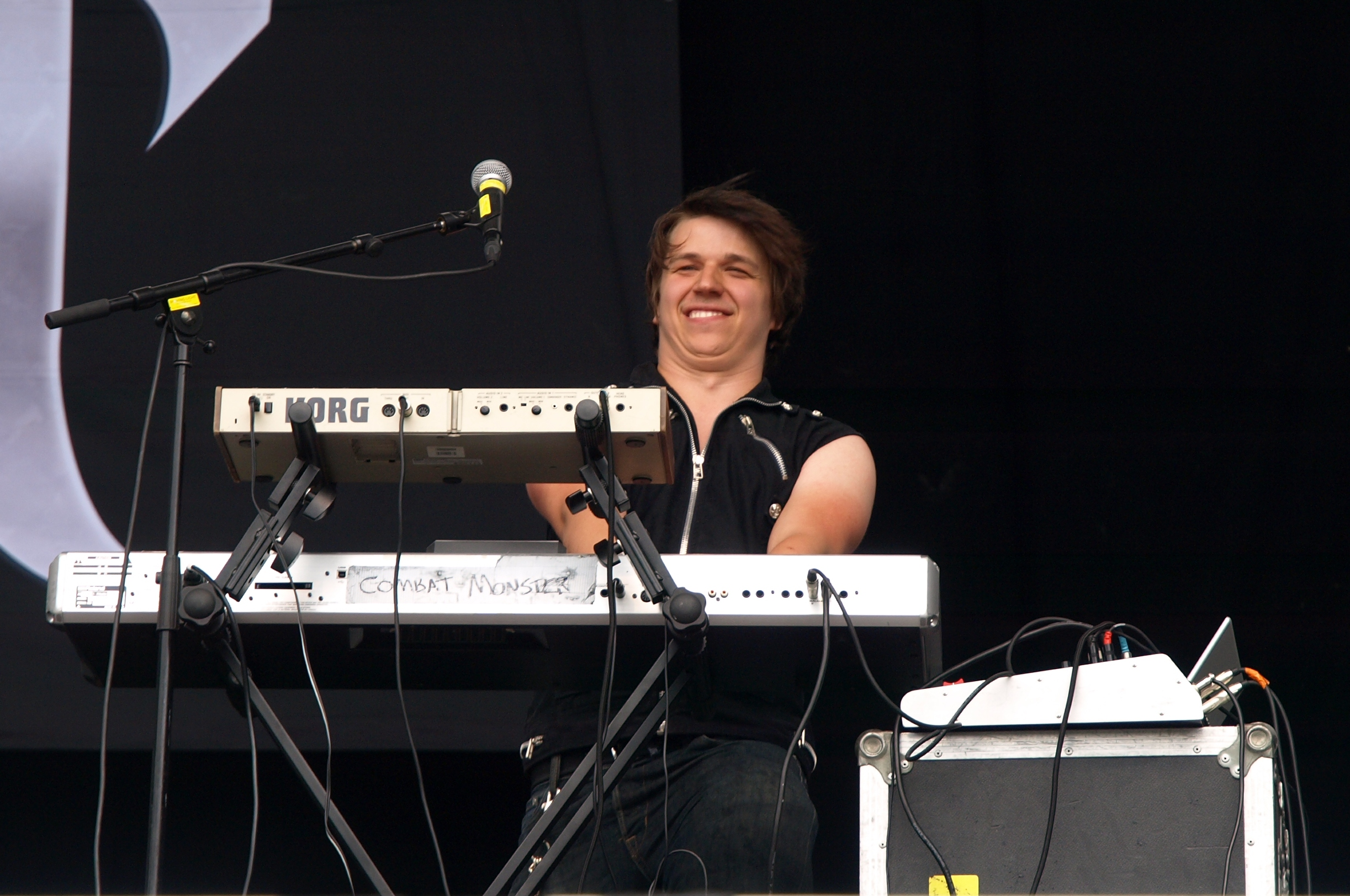 Battle Beast live am Myötätuulirock 2011